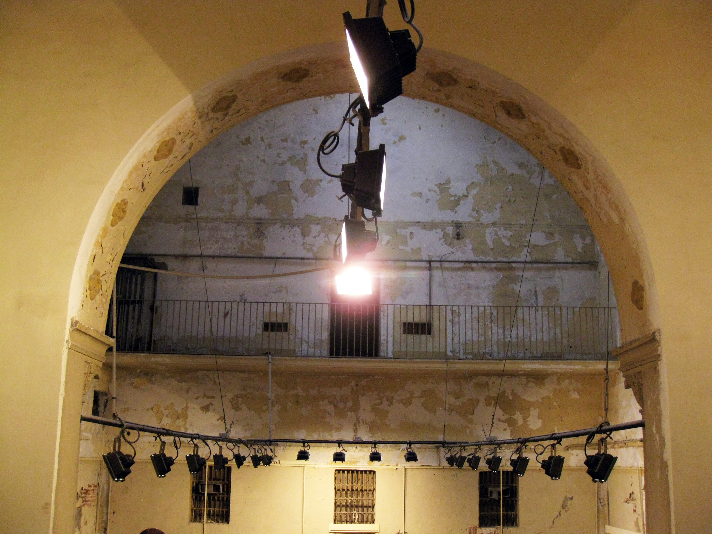 Convent de Santa Clara (Perpinyà), interior de l'antiga església, convertida durant la Revolució en presó; a dalt s'aprecia la galeria amb les cel·les .